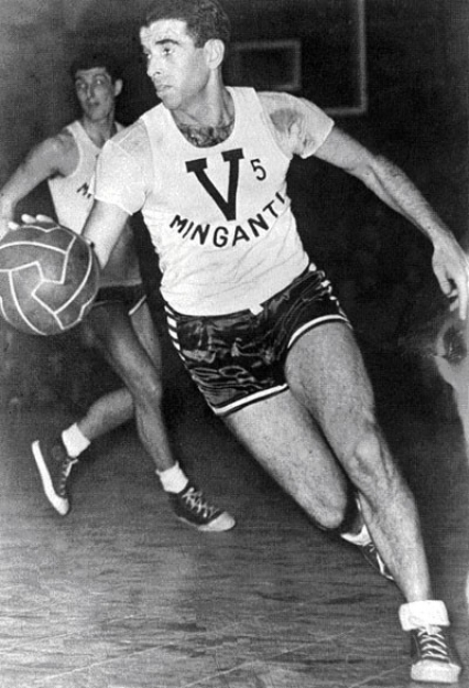 Vittorio Tracuzzi in palleggio con la maglia Virtus Bologna